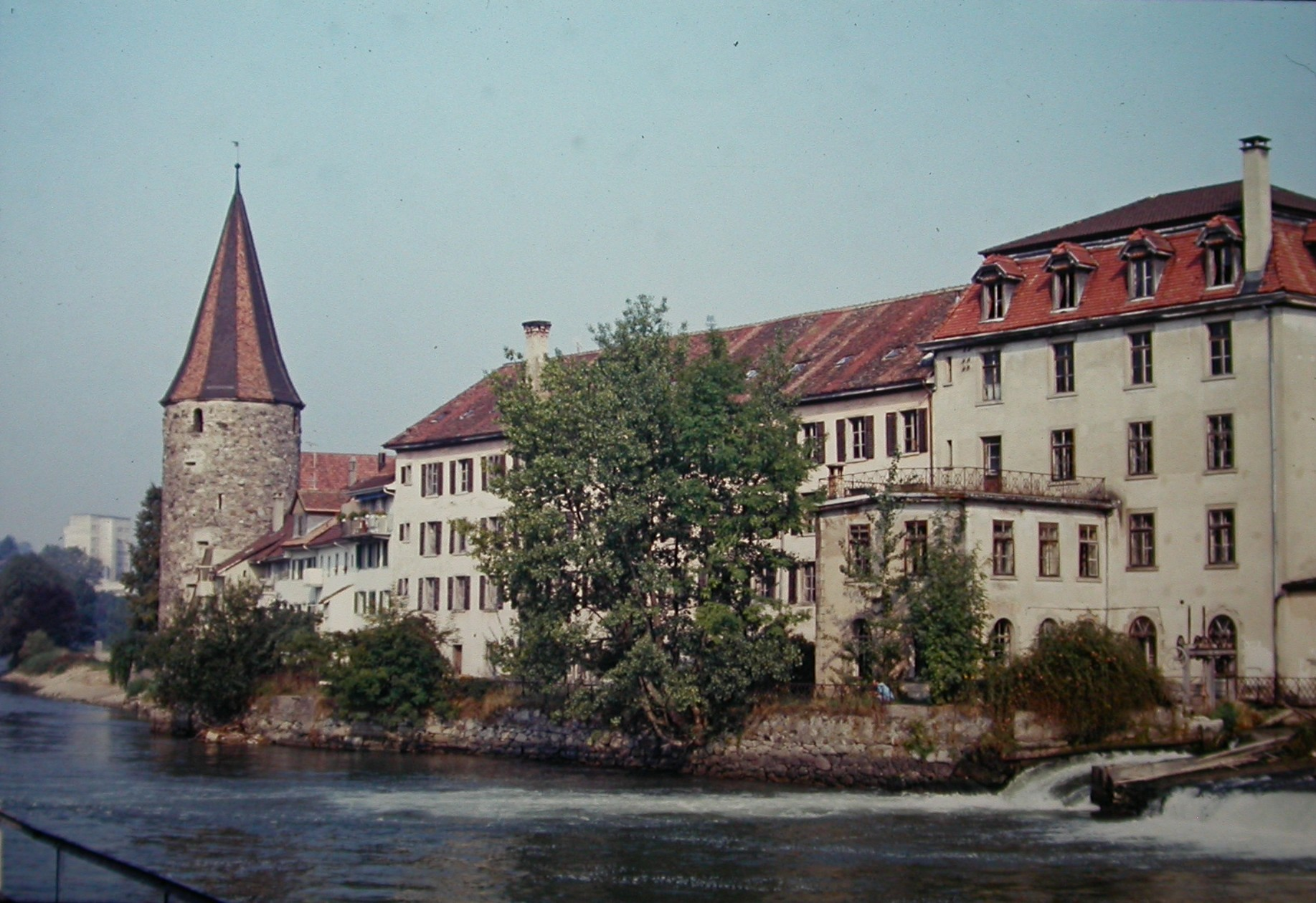 Bremgarten Altes Kraftwerk - heutige Museumsteile. Ca. 1240: Als erste Flussmühle baute das Kloster Hermetschwil die Luitolz Mühle in der Unterstadt. Bau der Brücke, der Längswehre und gleichzeitig der Bruggmühle durch die Stadt Bremgarten.